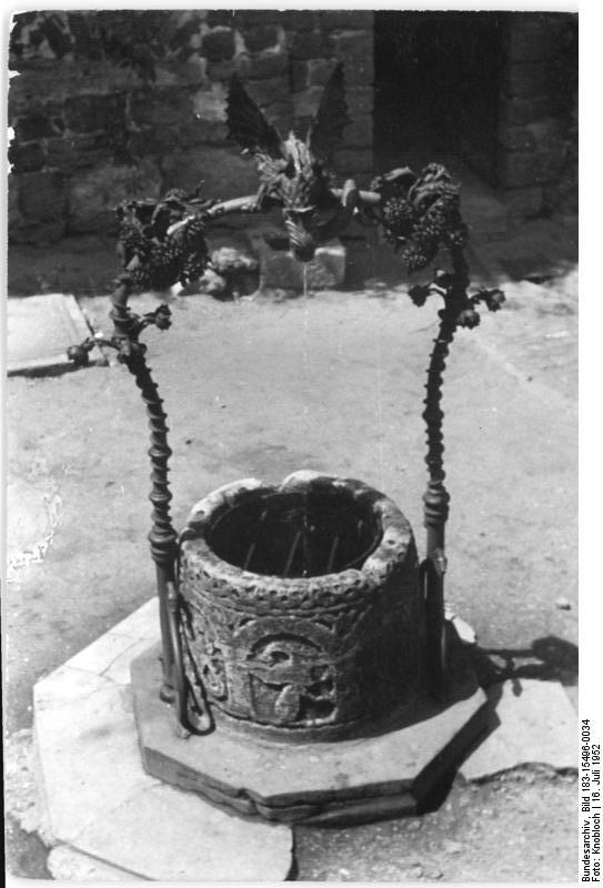 Eisenach, Wartburg, Brunnen Zentralbild Knobloch 16.7.1952 Mit dem FDGB-Feriendienst unterwegs. Durch Omnibusfahren, die der FDGB-Feriendienst veranstaltet, haben unsere Urlauber Gelegenheit, die nährere und weitere Umgebung ihren Ferienaufenthaltes kennenzulernen und auch kulturhistorisch wertvolle Bauten zu besichtigen. U.B.s.: Eisenach. Alter Brunnen im Hof der Wartburg.